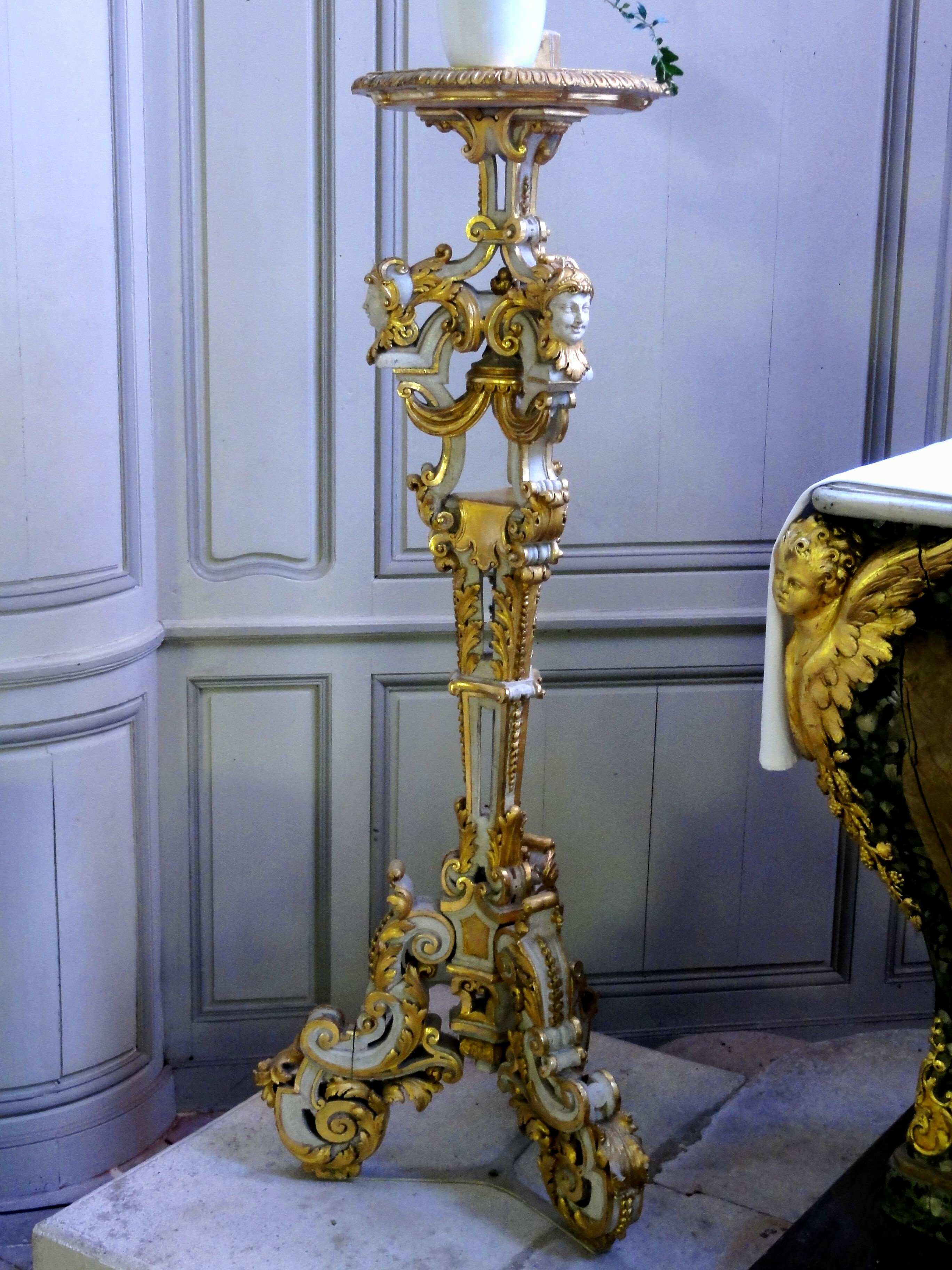 Guéridon, ancien chandelier pascal, datant du XVIIe siècle.